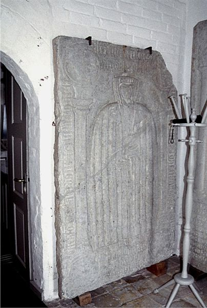 Hornslet Kirke i Danmark. Gravsten i våbenhuset over Anne Meinstorf